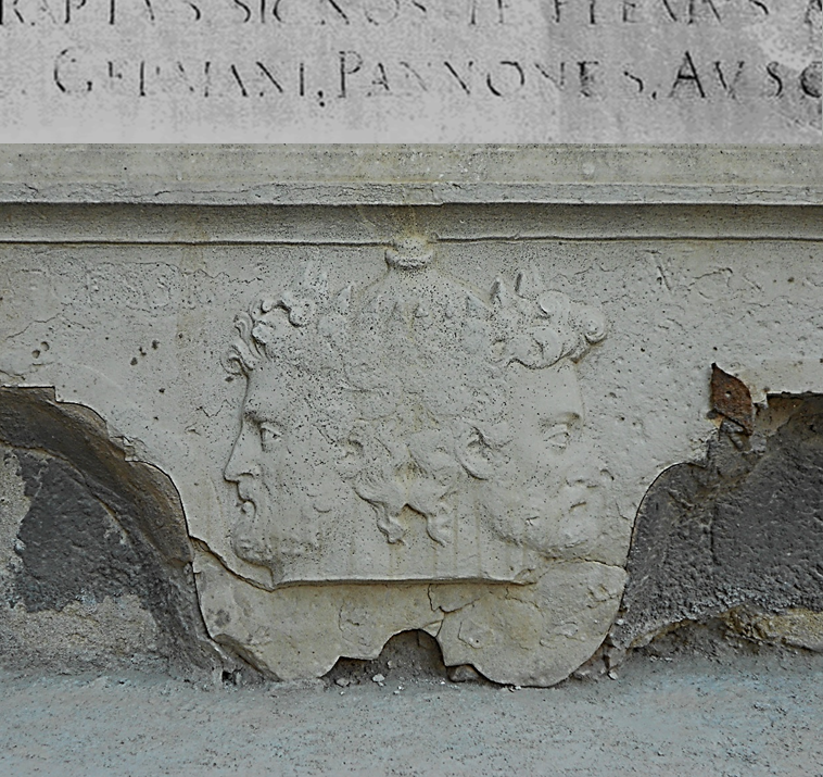 Bas relief Monument Ellebodius Bratislava